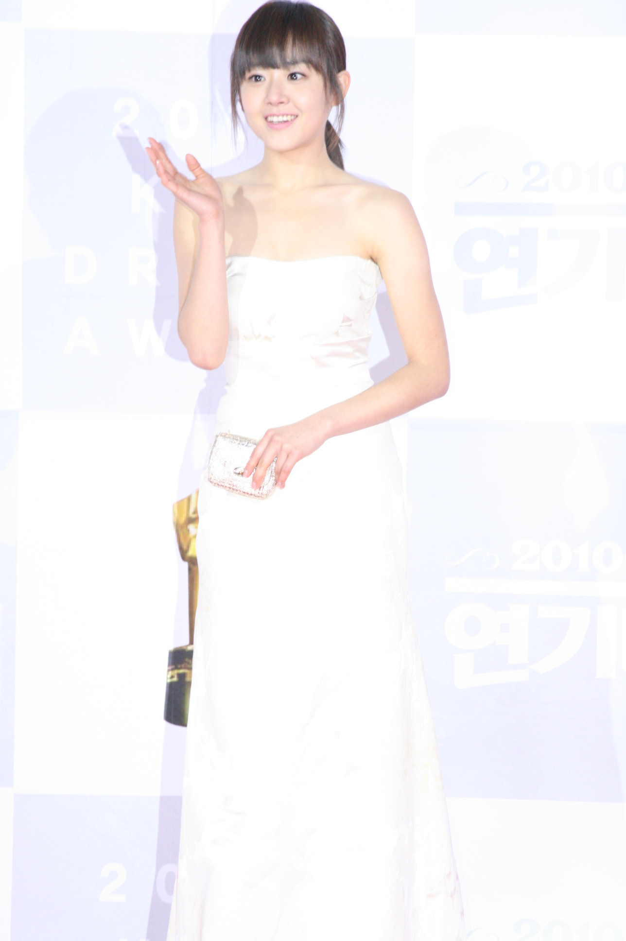 2010KBS연기대상 502